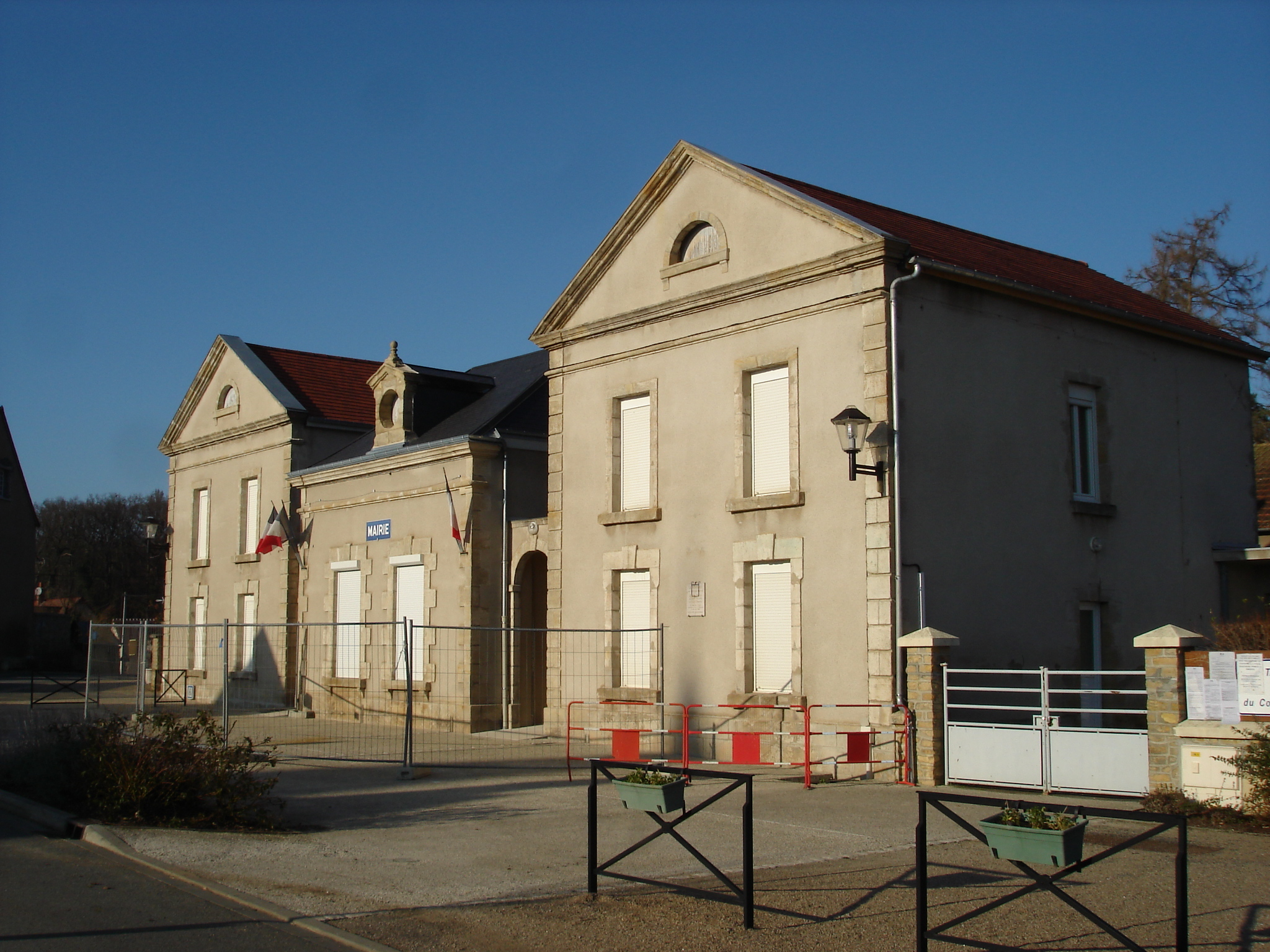 Briantes (36) : La mairie.